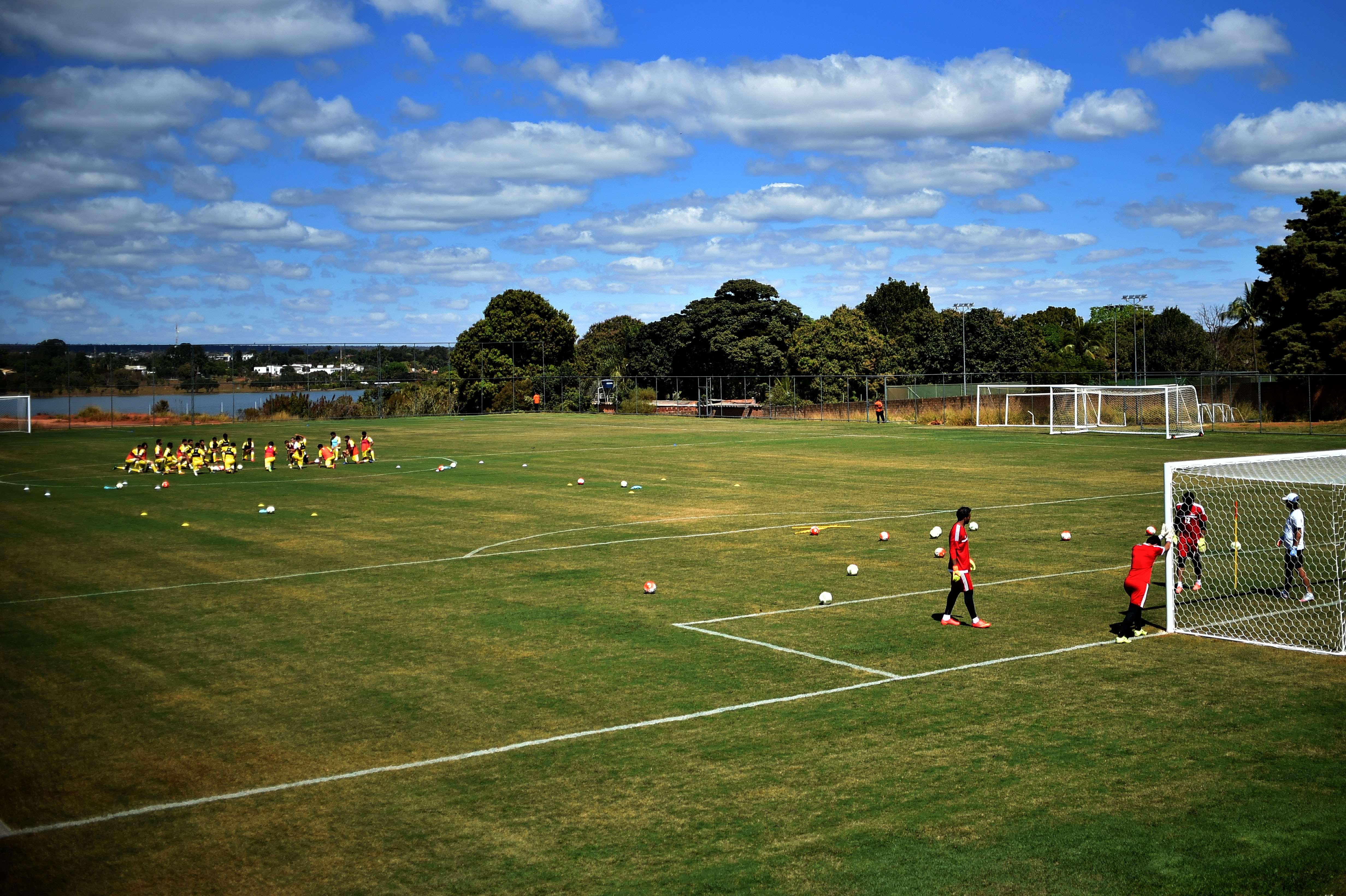 Centro de Treinamento do Brasiliense, Setor de Clubes Sul, Brasília, DF, Brasil 1/8/2016 Foto: Andre Borges/Agência Brasília. A equipe olímpica de futebol masculino do Iraque treinou nesta segunda-feira (1º), no Centro de Treinamento do Brasiliense, no Setor de Clubes Sul.